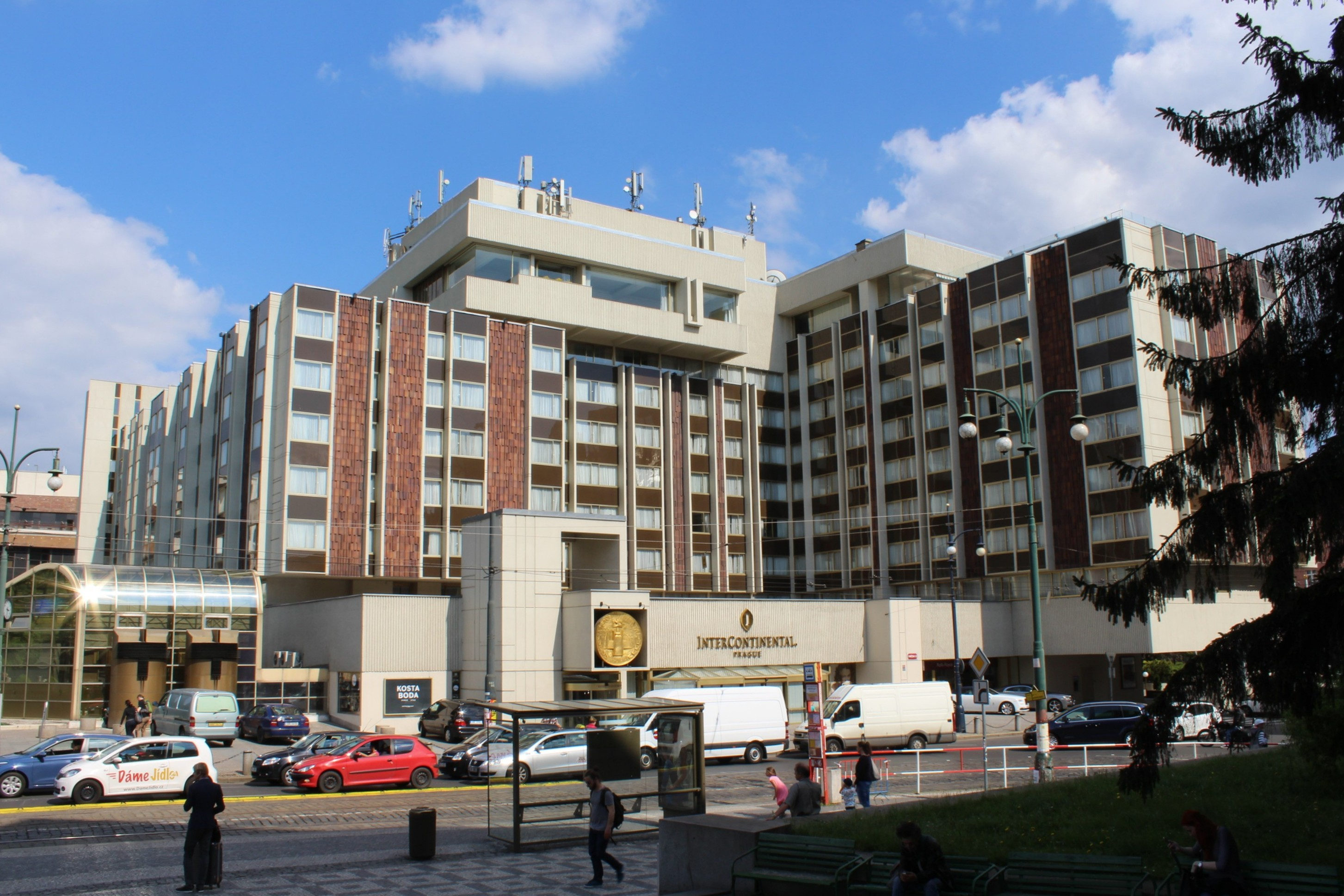 Hotel InterContinental Praha